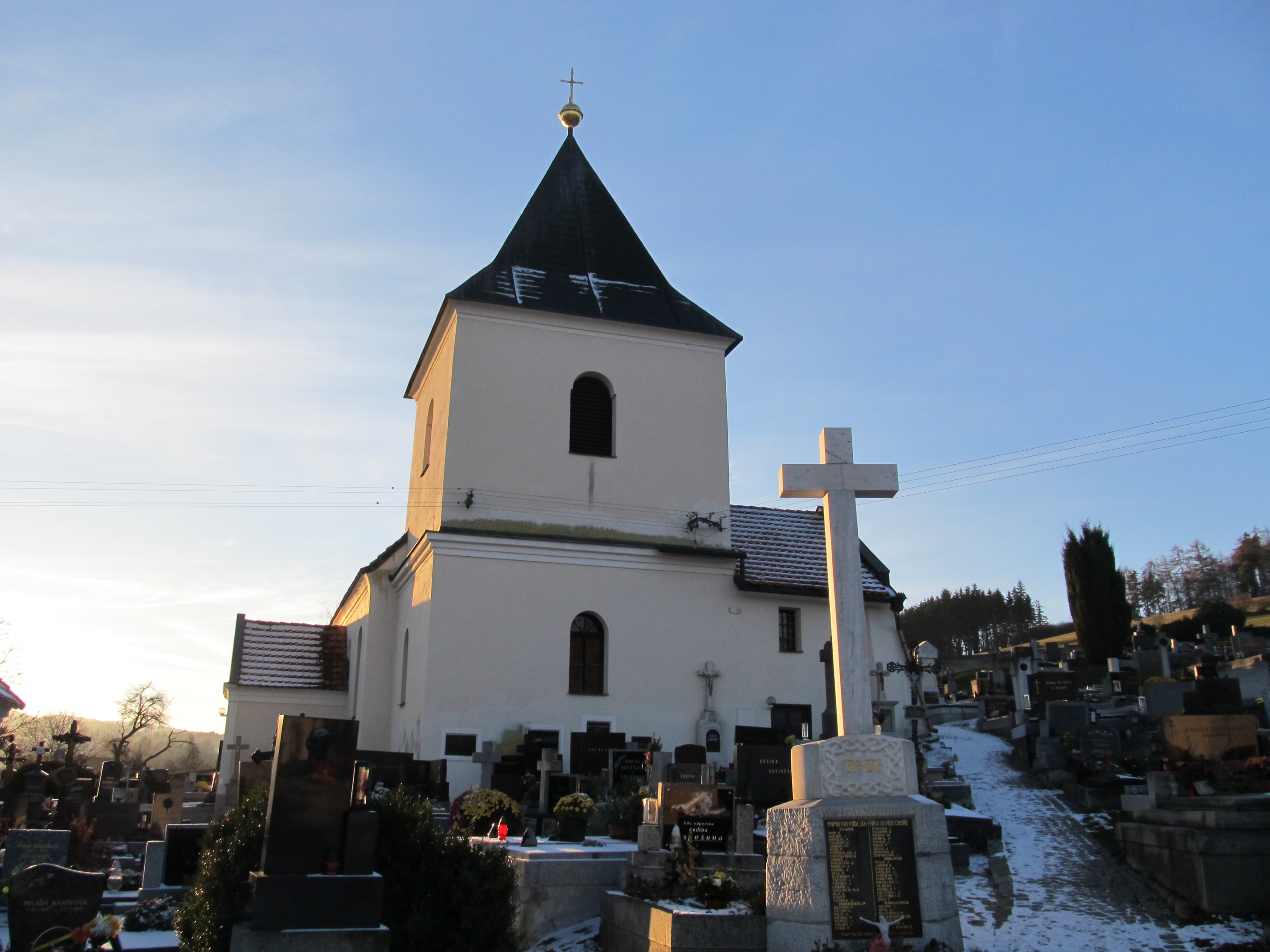 Čkyně - kostel svaté Máří Magdalény